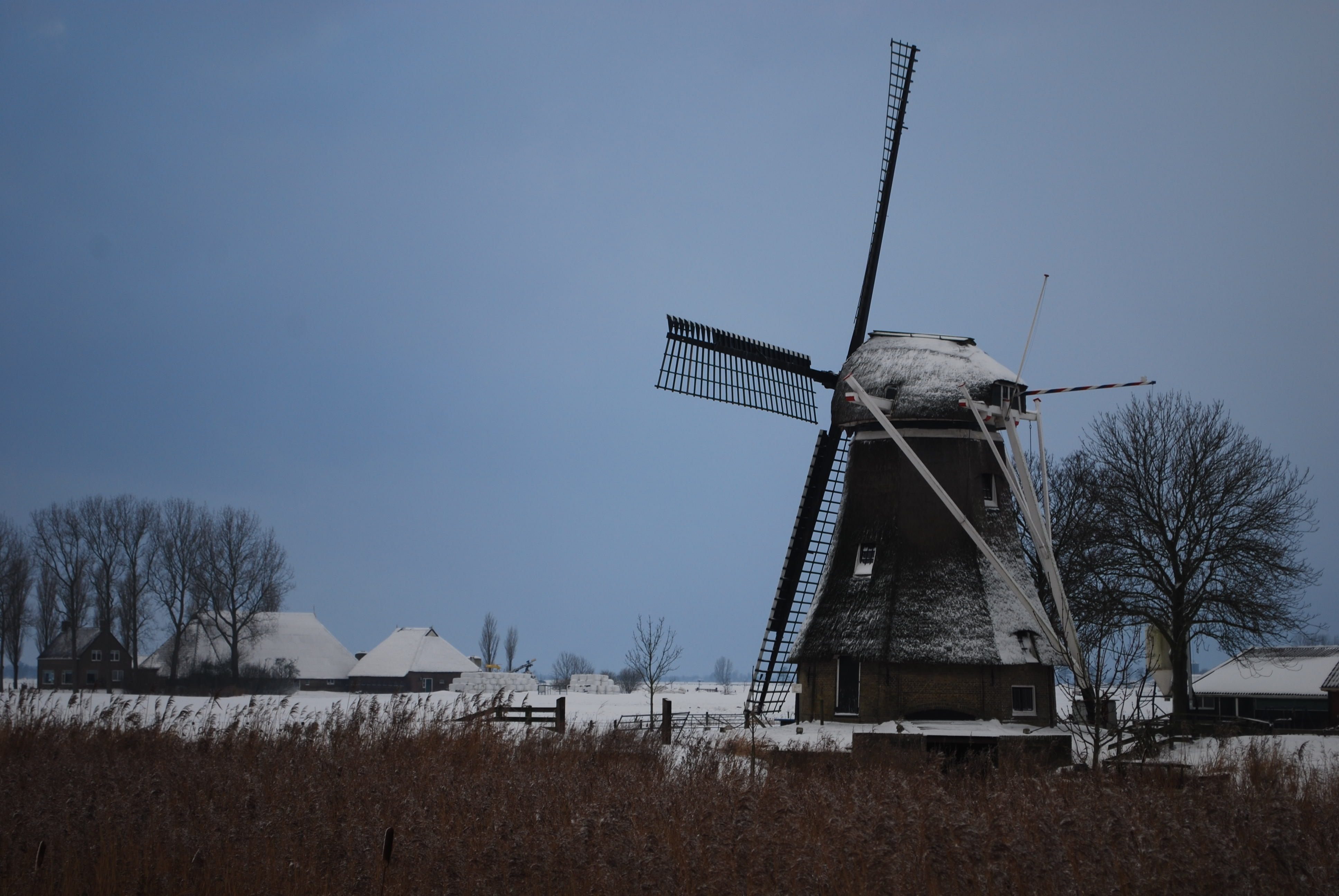 Molen Tochmaland in de winter